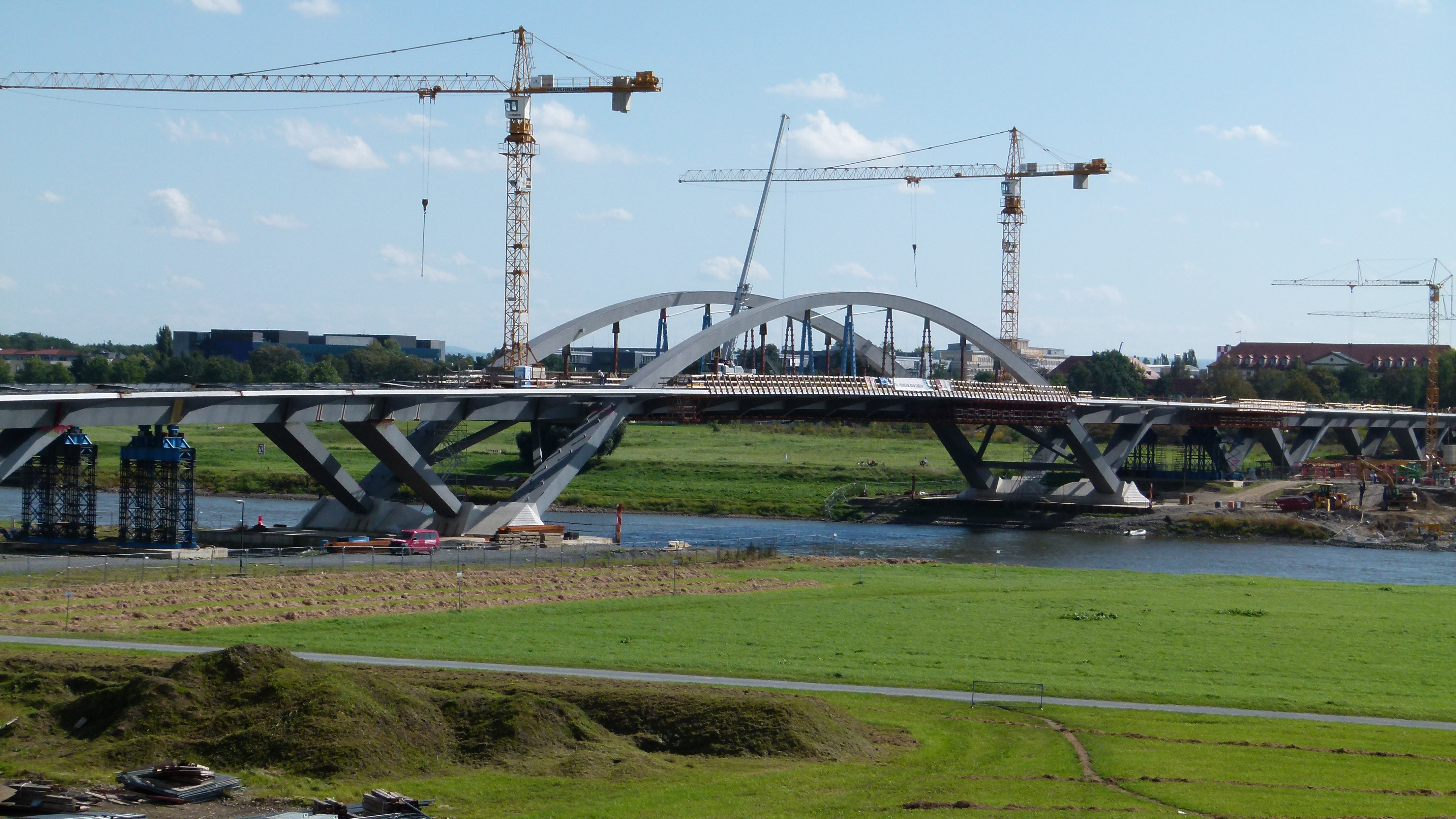 Der Bau der Waldschlößchenbrücke in Dresden im September 2011